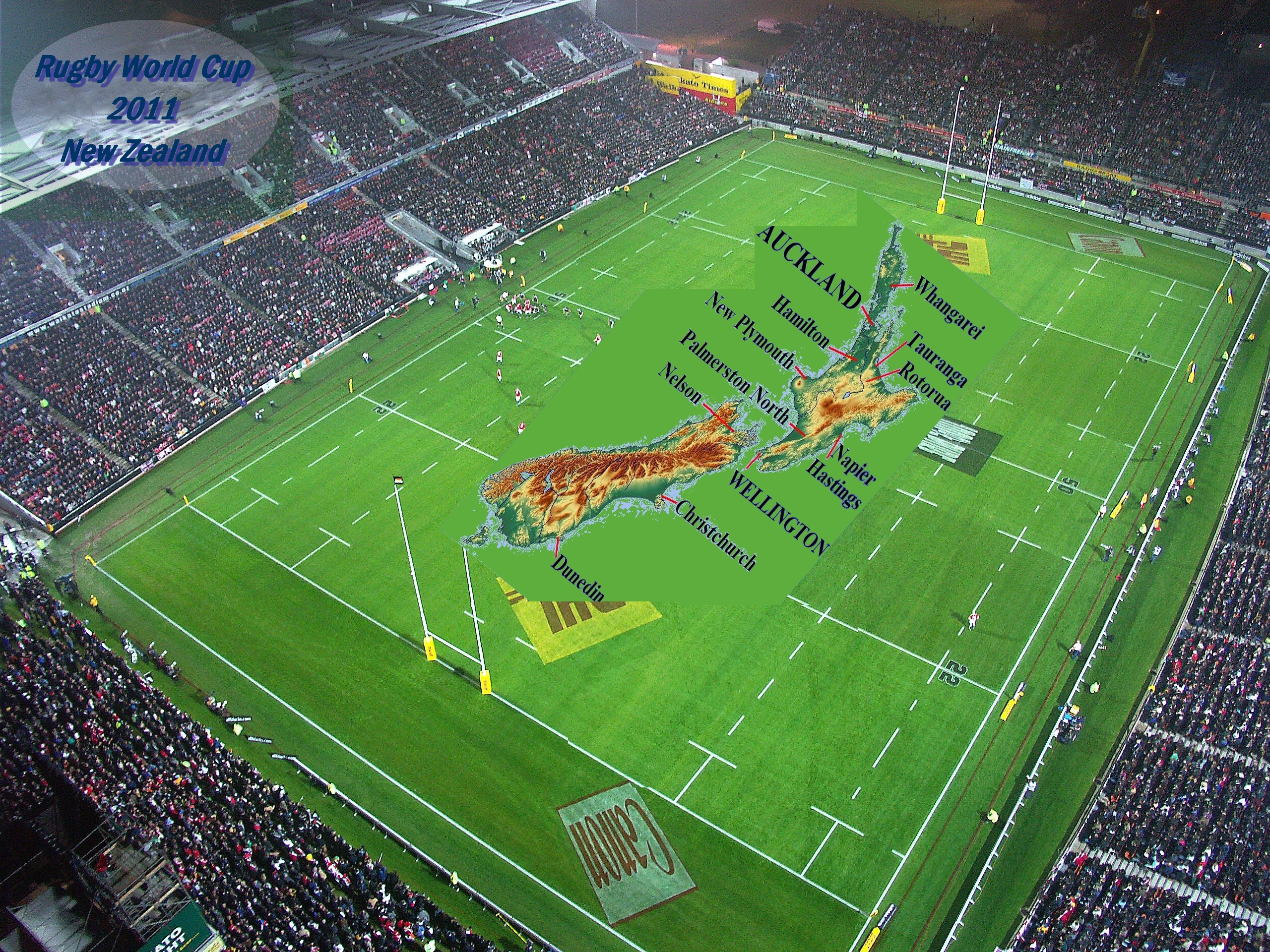 Montage pour la Rugby World Cup 2011 - New Zealand avec File:New Zealand Cities.PNG (User:Aircorn) et File:Hamilton 03.jpg (Hamilton City Council); sous licence GFDL